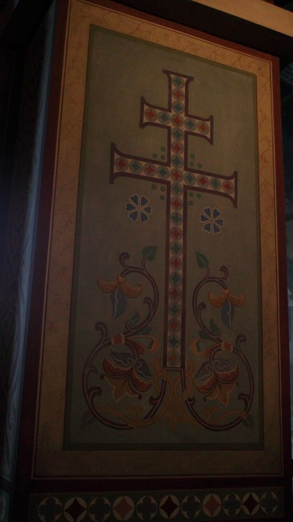 Шестиконечный крест на стенах новгородского собора святой Софии